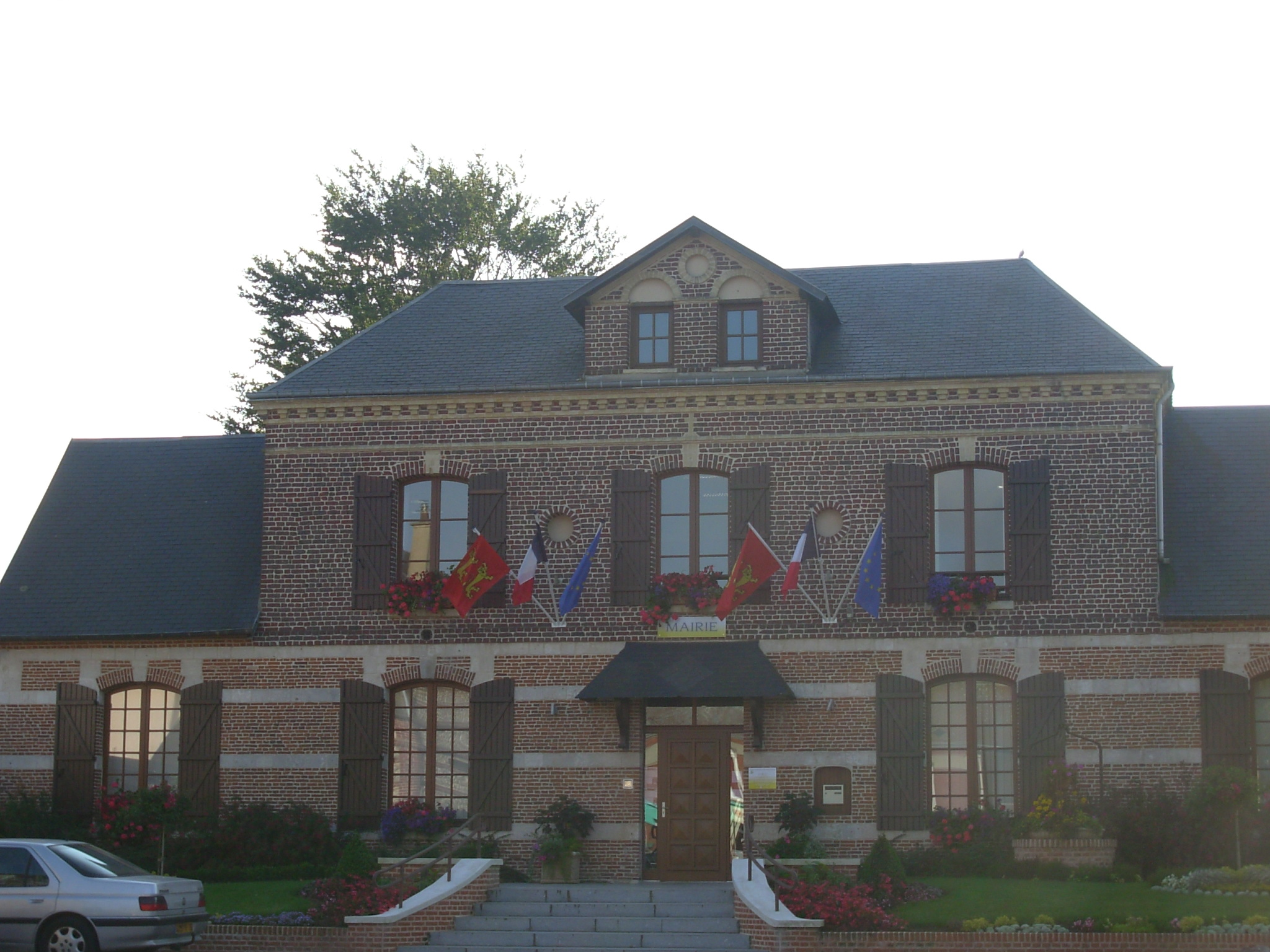 Mairie de Sainneville sur Seine